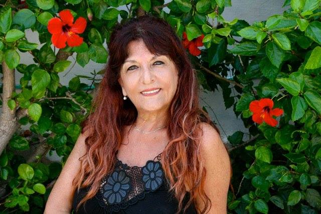 תמונתה של שוקי הופמן